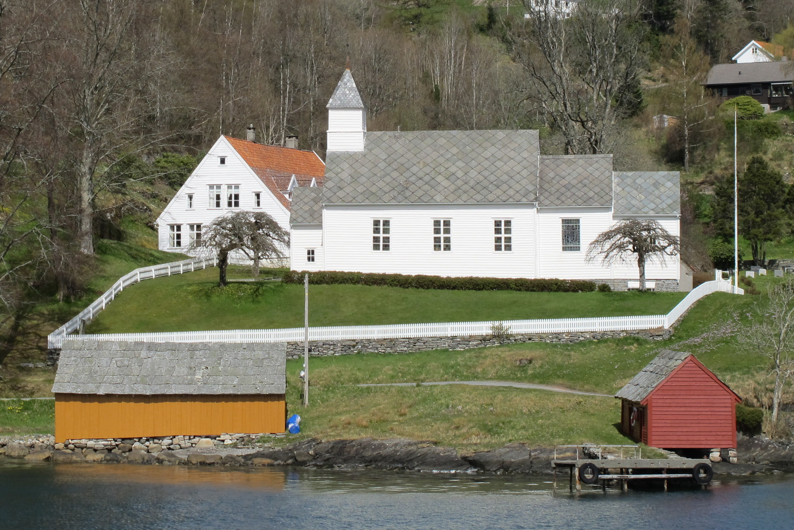 Fjelberg kyrkje, mai 2017